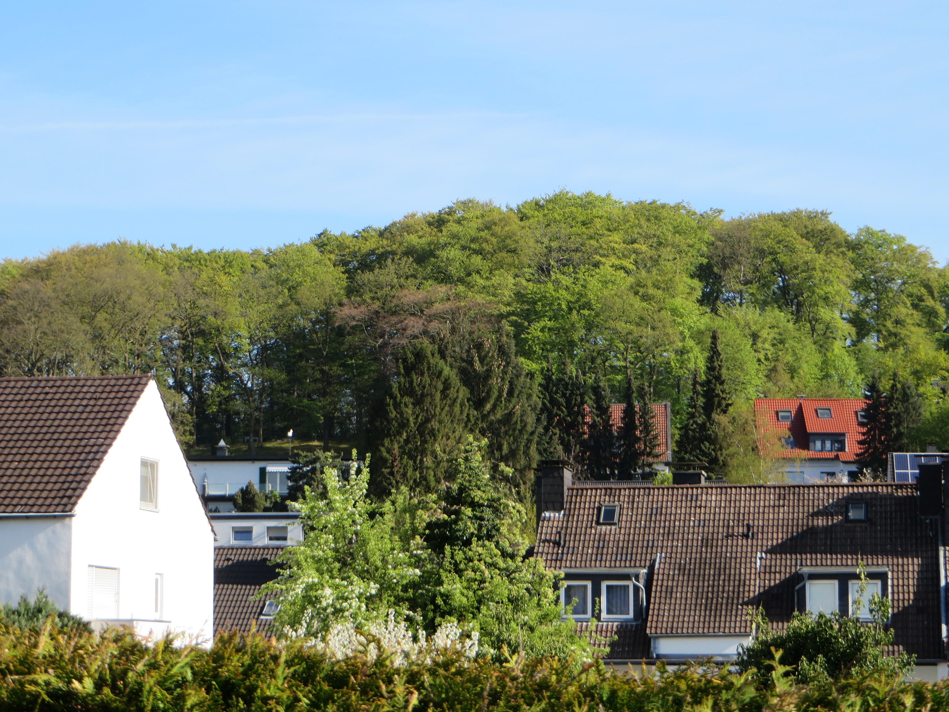 Landschaftsschutzgebiet „Rosengarten-noerdlich Eppenhauser Strasse“ in Hagen. Kleines Waldgebiet zwischen Rosenstraße und Eppenhauser Straße in Höhe der Hagener Jugendherberge. Daran östlich anschließend (Foto rechts) befindet sich der geschützte Landschaftsbestandteil „Rosengarten/nördlich Eppenhauser Straße“ mit einem Buchenwaldrestbestand auf der markanten Geländekuppe.